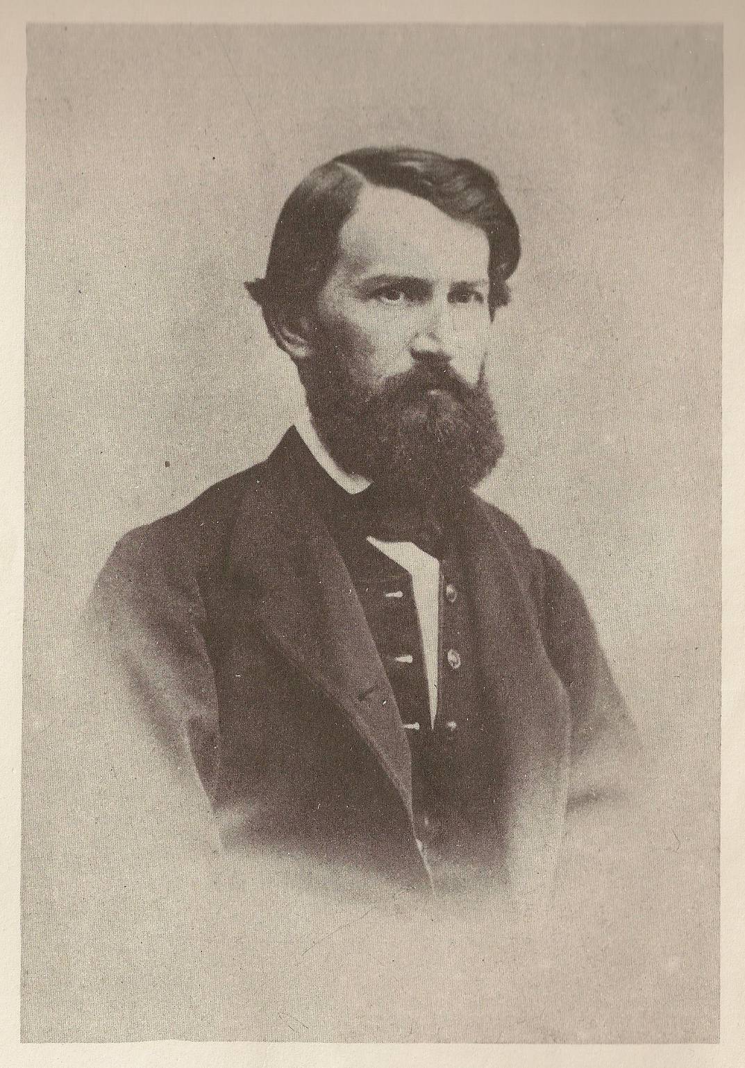 Константин Дмитриевич Ушинский